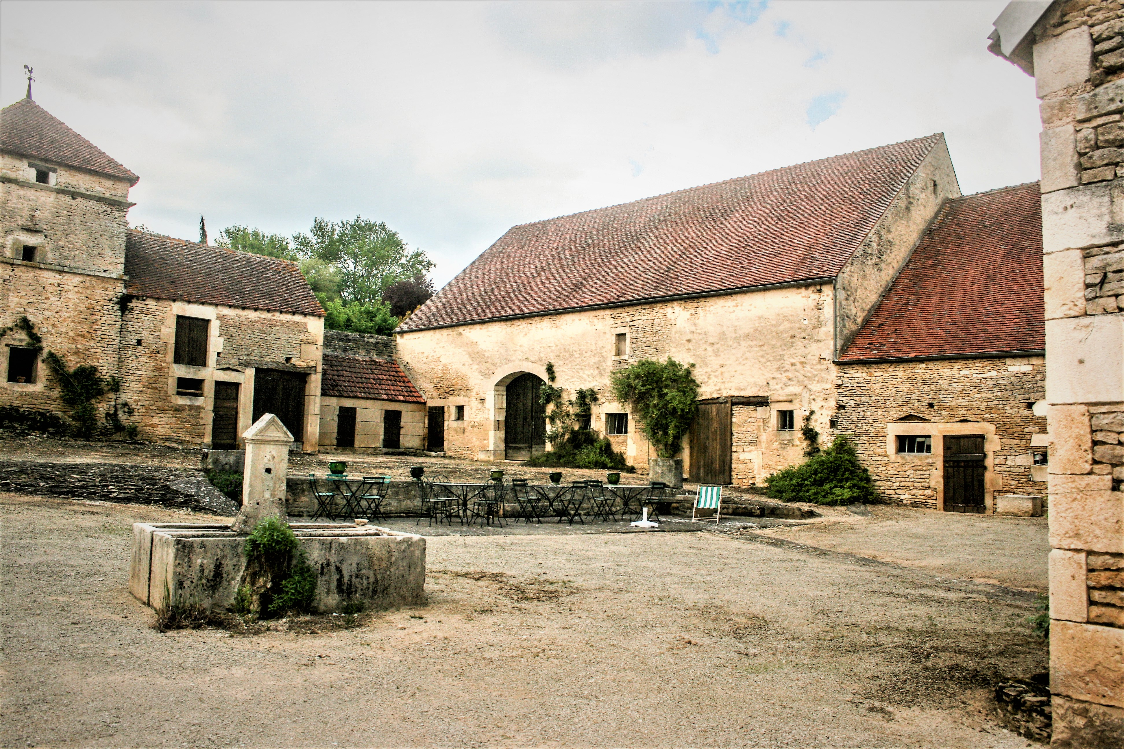 Cour et corps de ferme de La Pothière. Etalante. Côte-d'Or